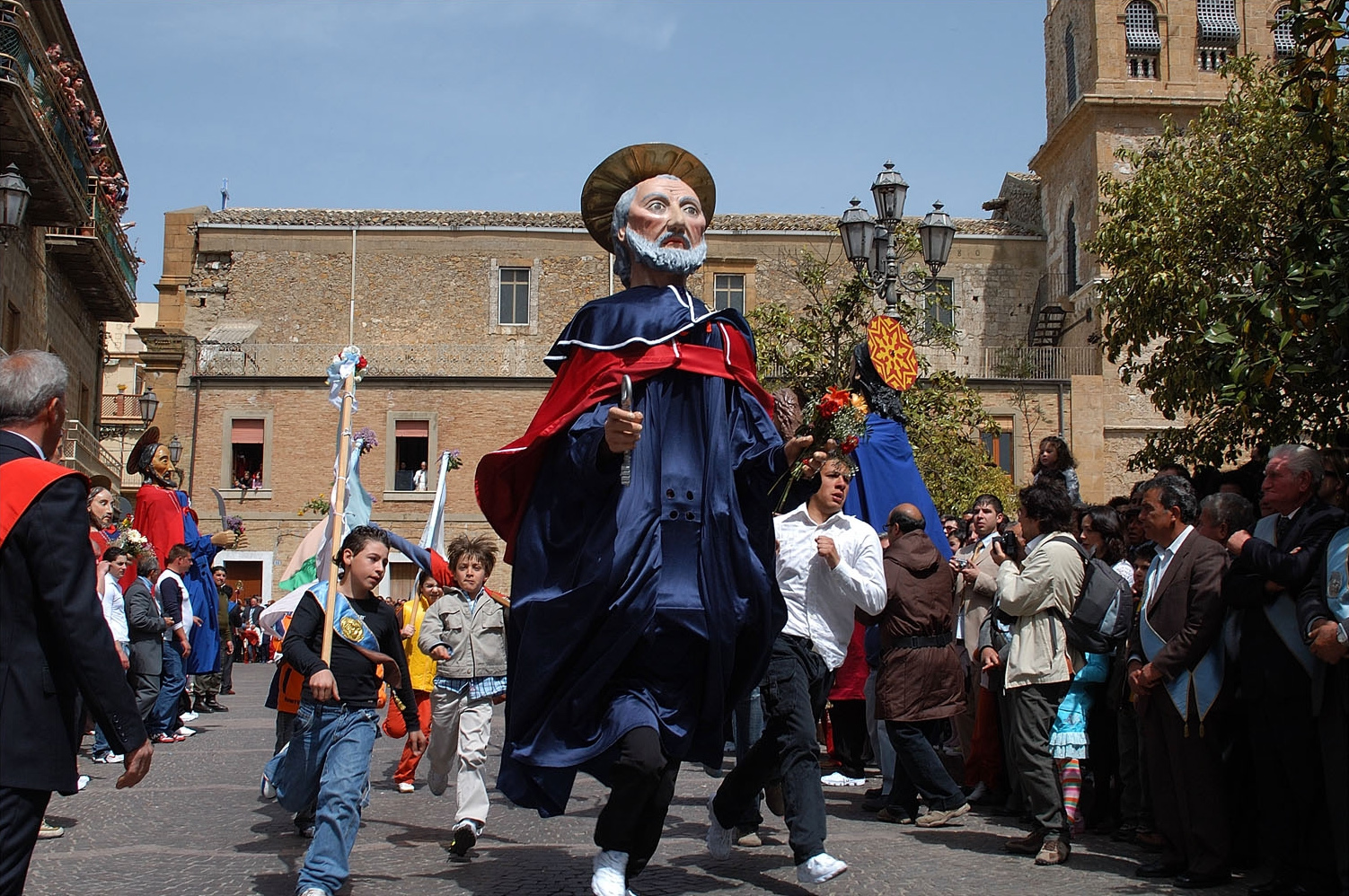 Aidone, EN_Sicilia: La giunta di Pasqua, corsa dei Santoni (San Pietro)